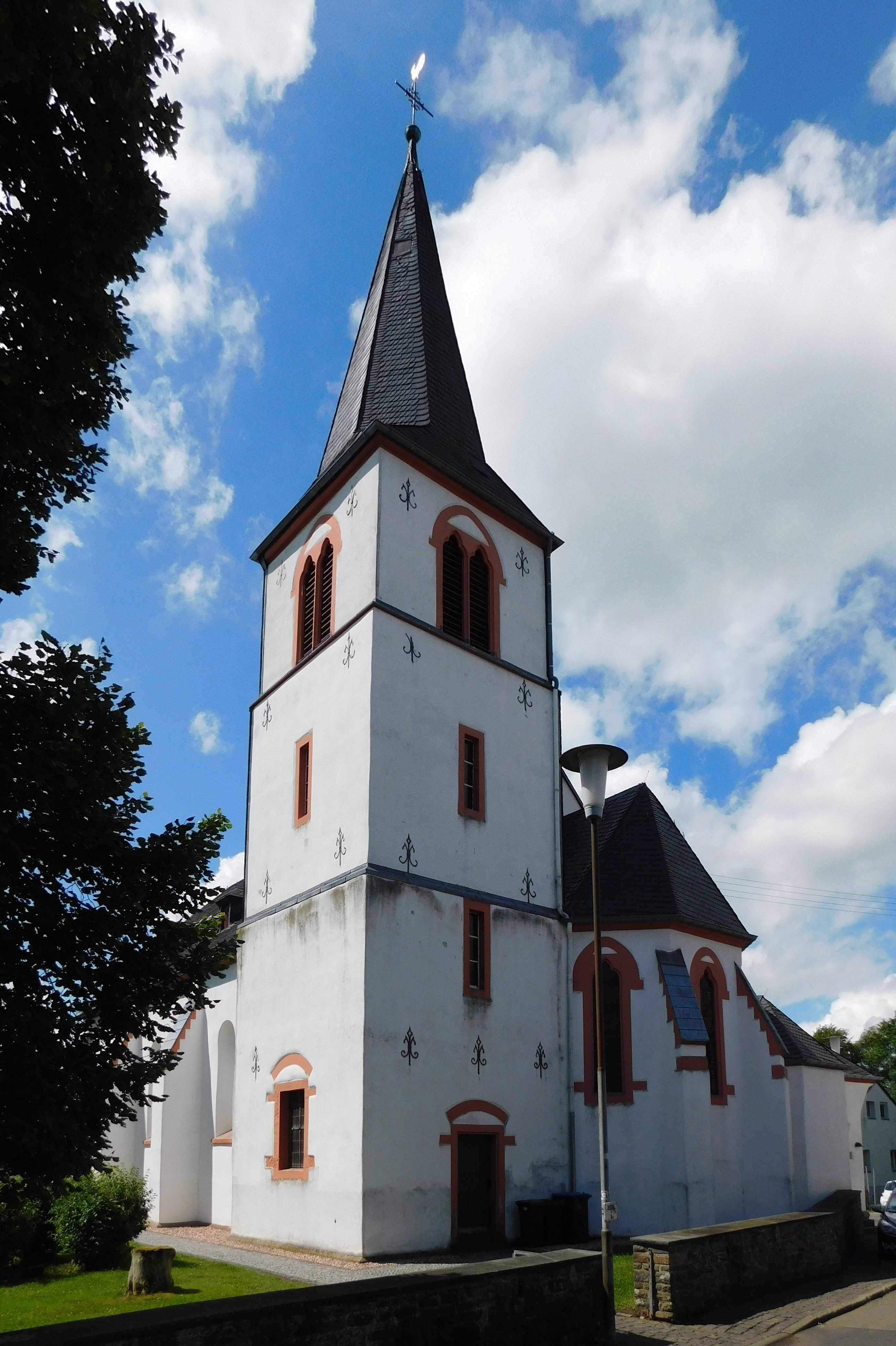 St.-Barbara-Kirche in Hellenthal-Rescheid